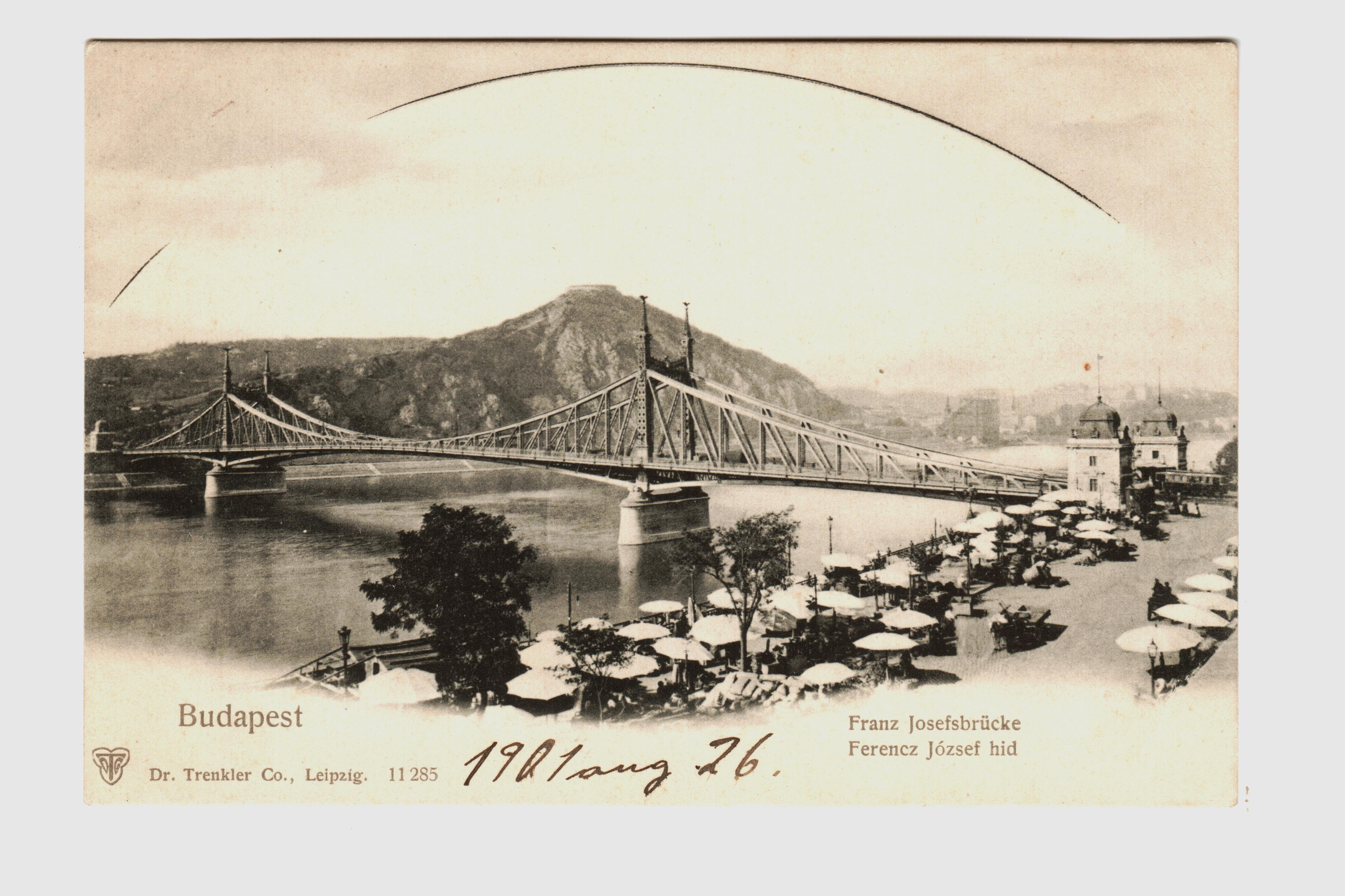 Szabadság-híd (Ferencz József-híd), 1901